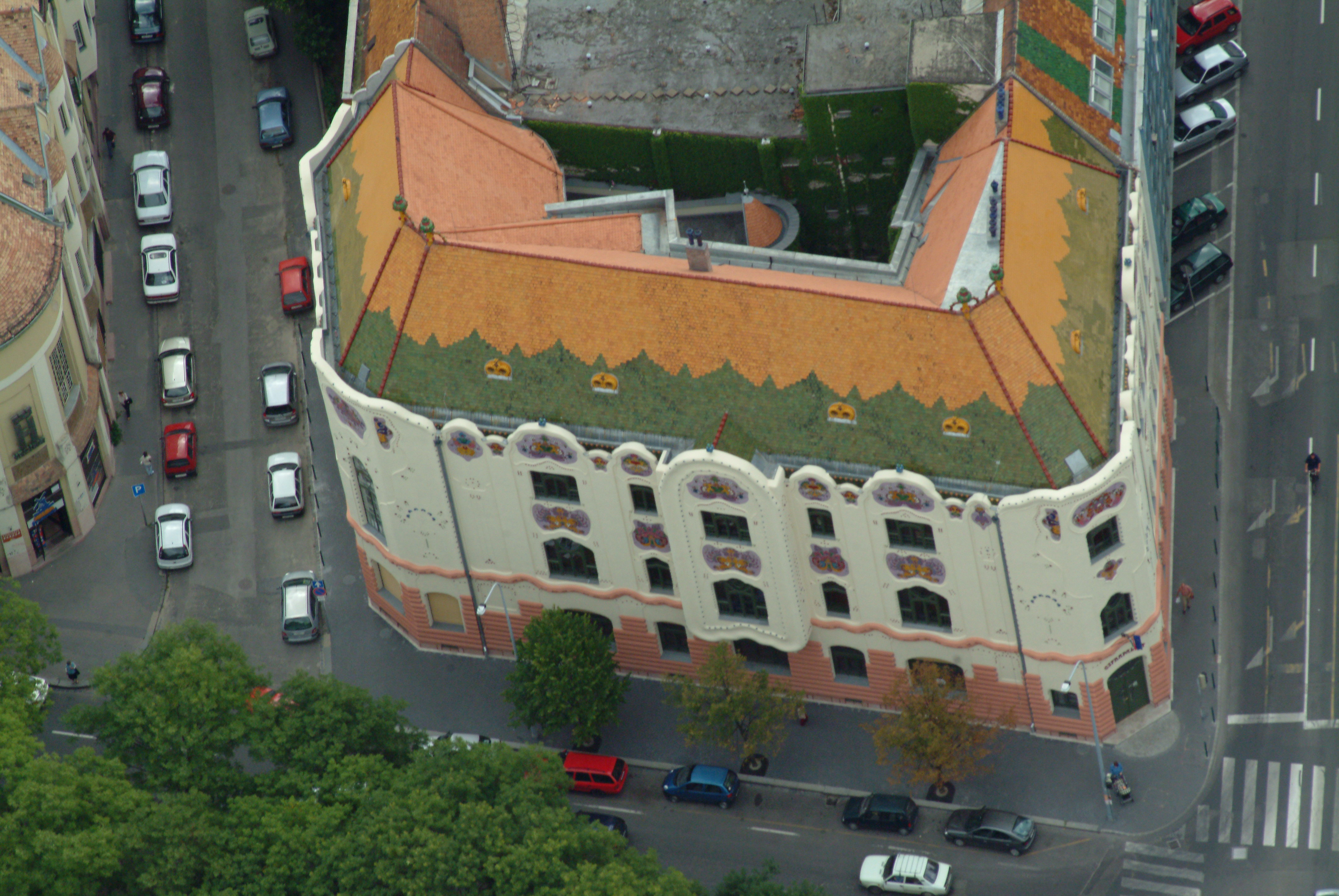 Cifra Palota - Kecskemét - Hungary - Europe